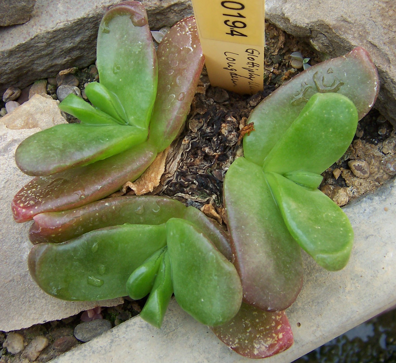 Glottiphyllum longum, habitus